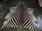 zebras āda. සිංහල: A mother nursing her young blends into a stand of deadwood.